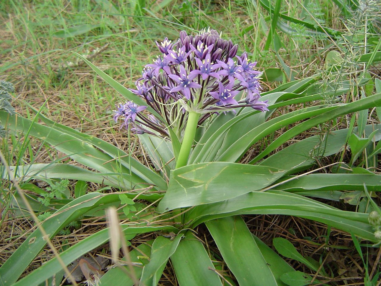 Scilla peruviana L. (Flor de la corona),Costa de Cádiz España